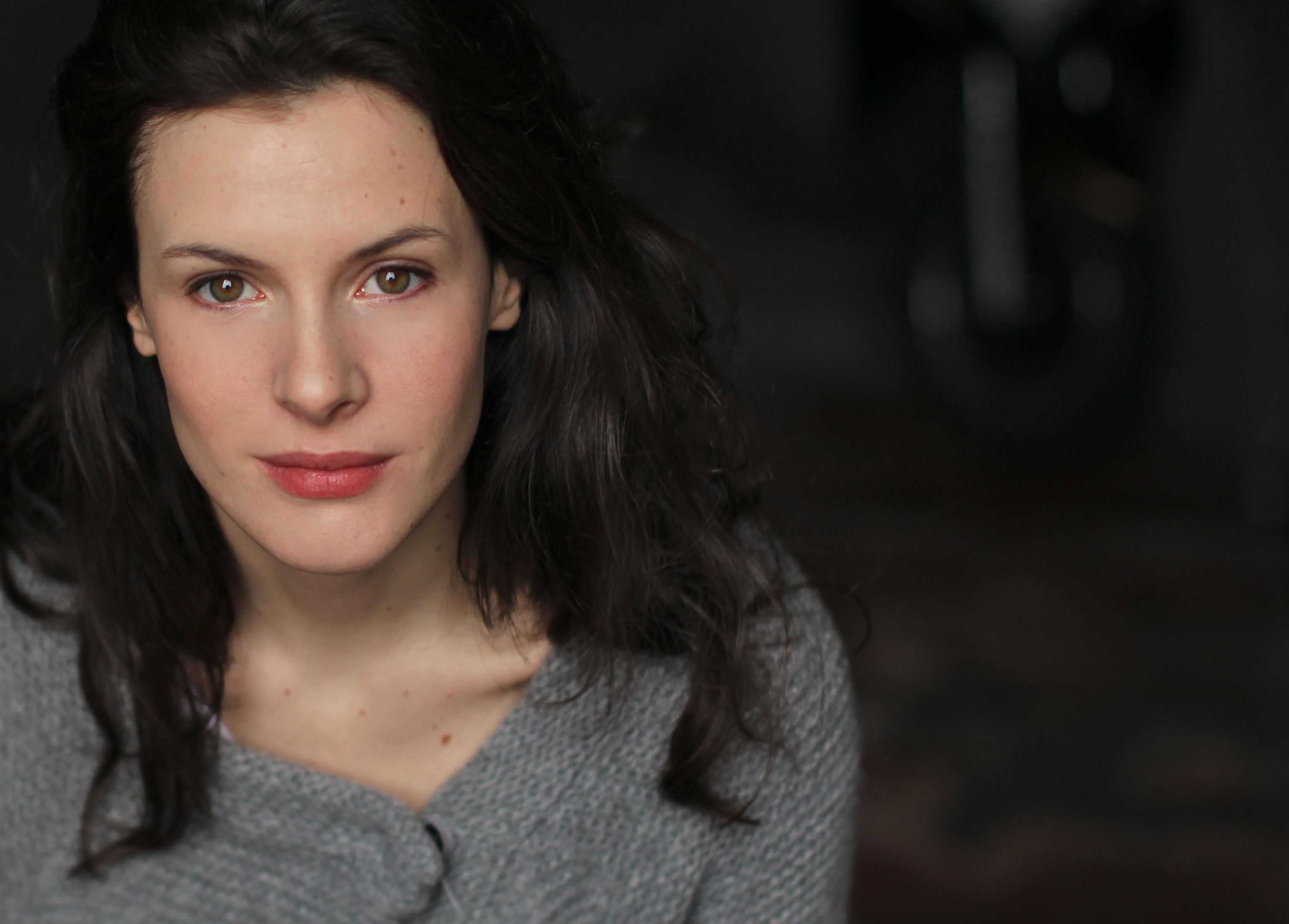 Actress